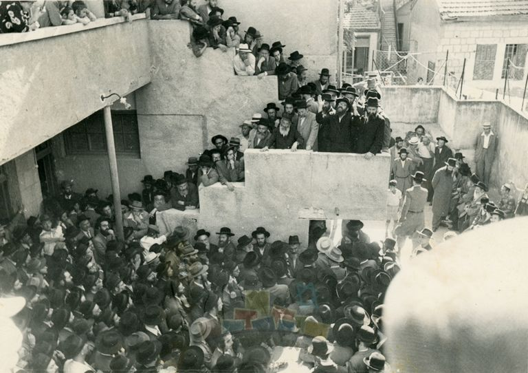 הלוויתו של הרב יעקב חנוך סנקביץ', ראש ישיבת שפת אמת-גור, שנפטר בפתאומיות בראש השנה.